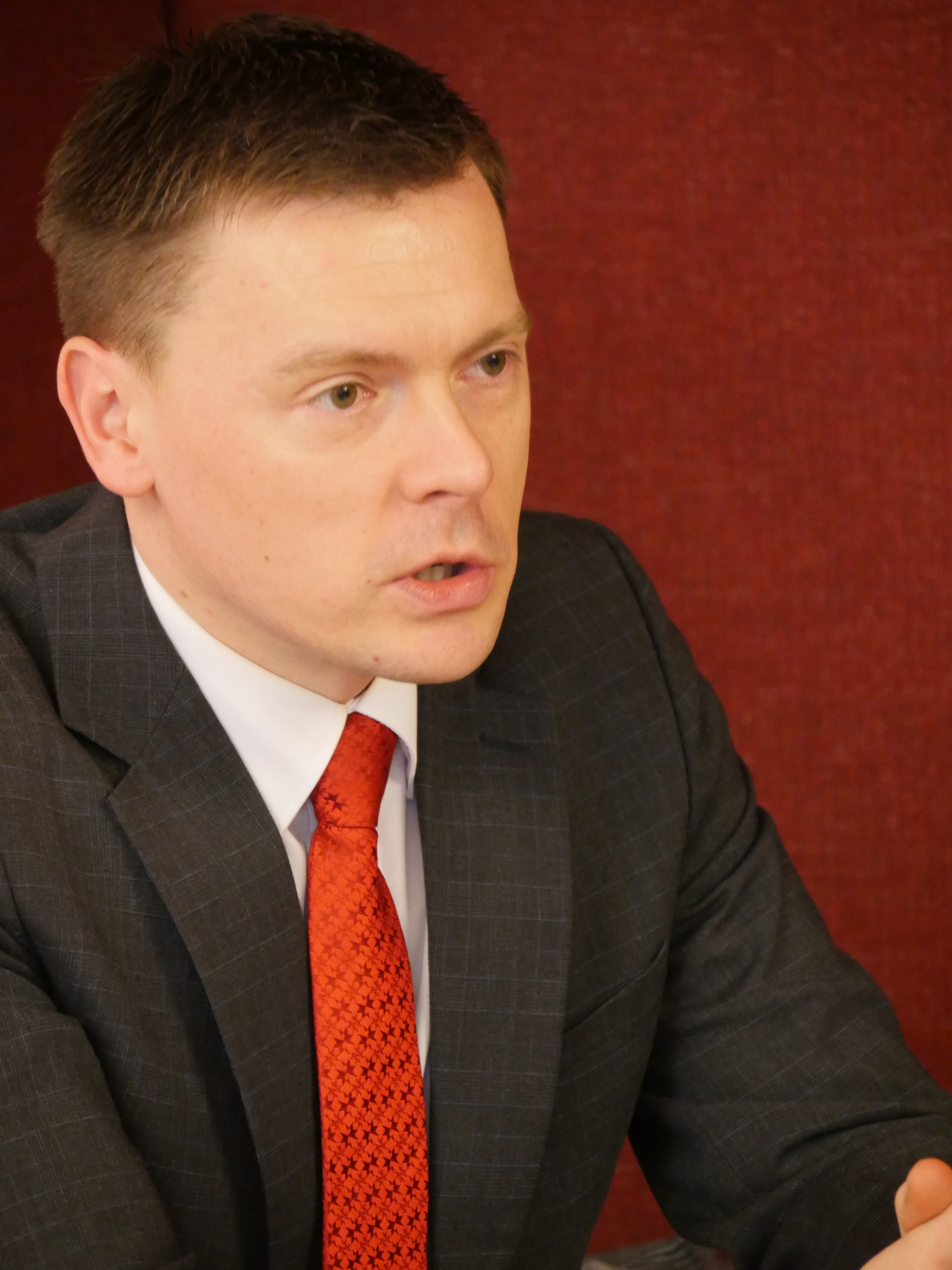 Dmitri Jegorov, rahandusministeeriumi maksu-ja tollipoliitika asekantsler. Eesistumise teemaline avalik arutelu, Tartu ülikooli Narva kolledž